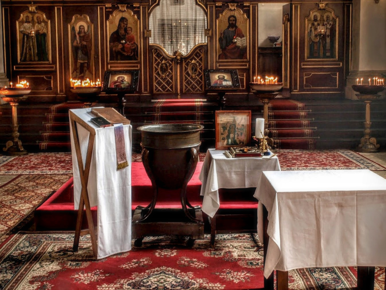 Interiér chrámu sv. Cyrila a Metoděje v Praze